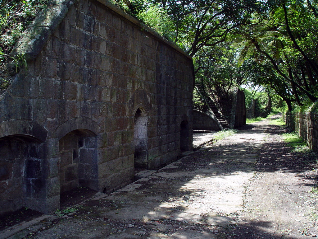 中文（台灣）: 槓子寮砲臺的軍事營區通道。